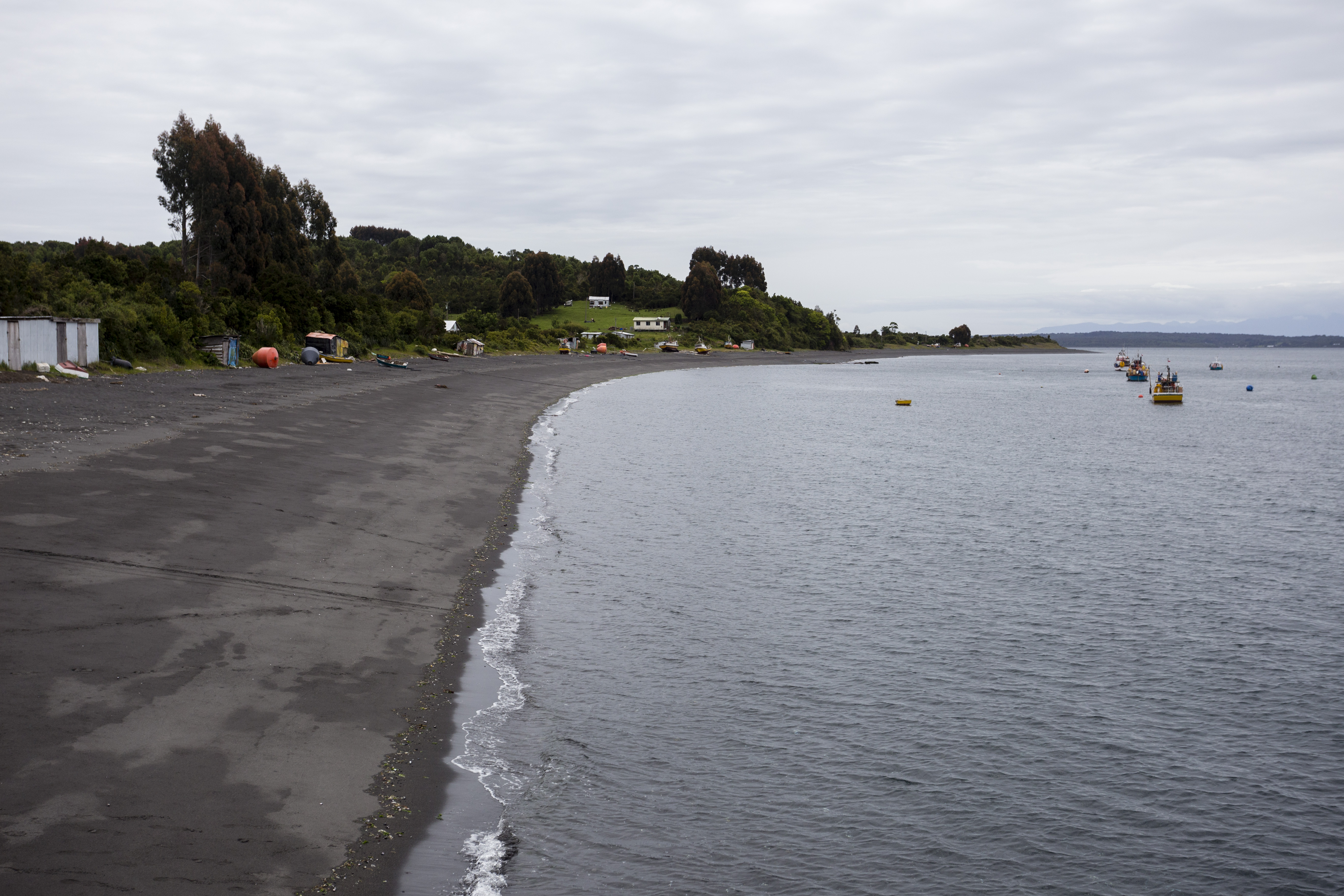 Isla Chuit, grupo Desertores, Chaitén.